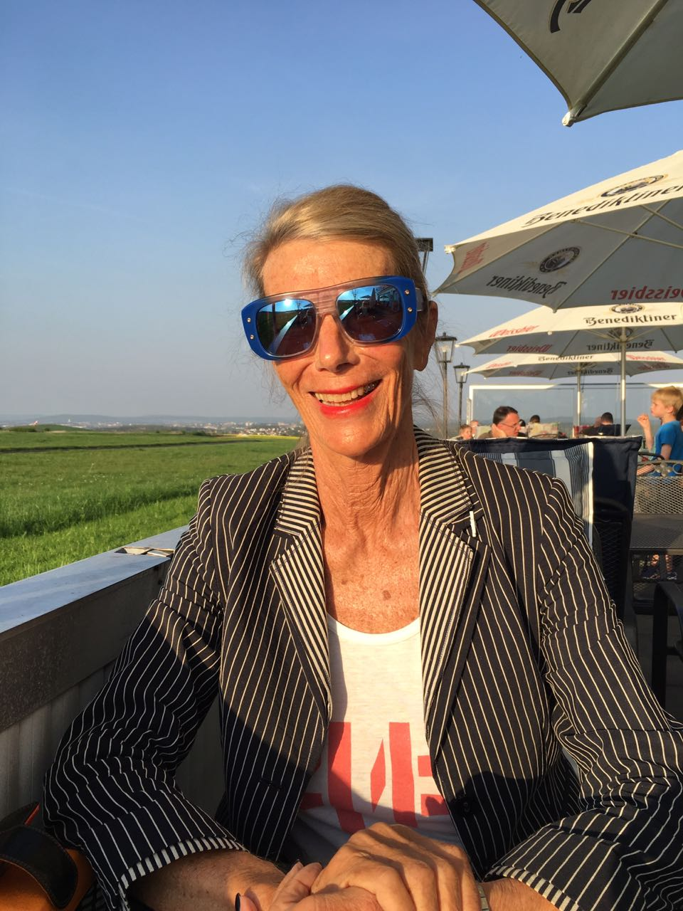 Zeigt Dr. Dorothea von Ritter-Röhr